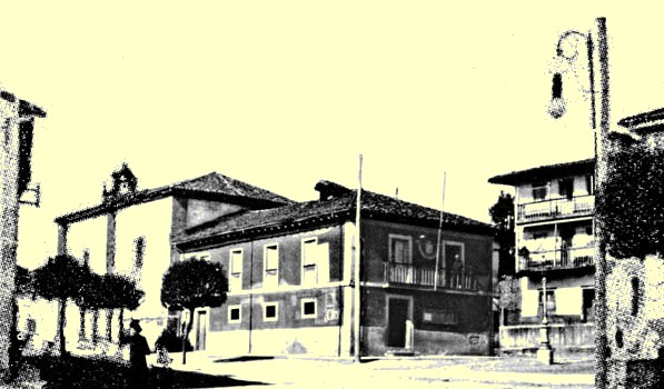 Fotografía la Capilla del Hospital en el concejo de Noreña, construido en 1593 por D. Gabriel Lorezana.